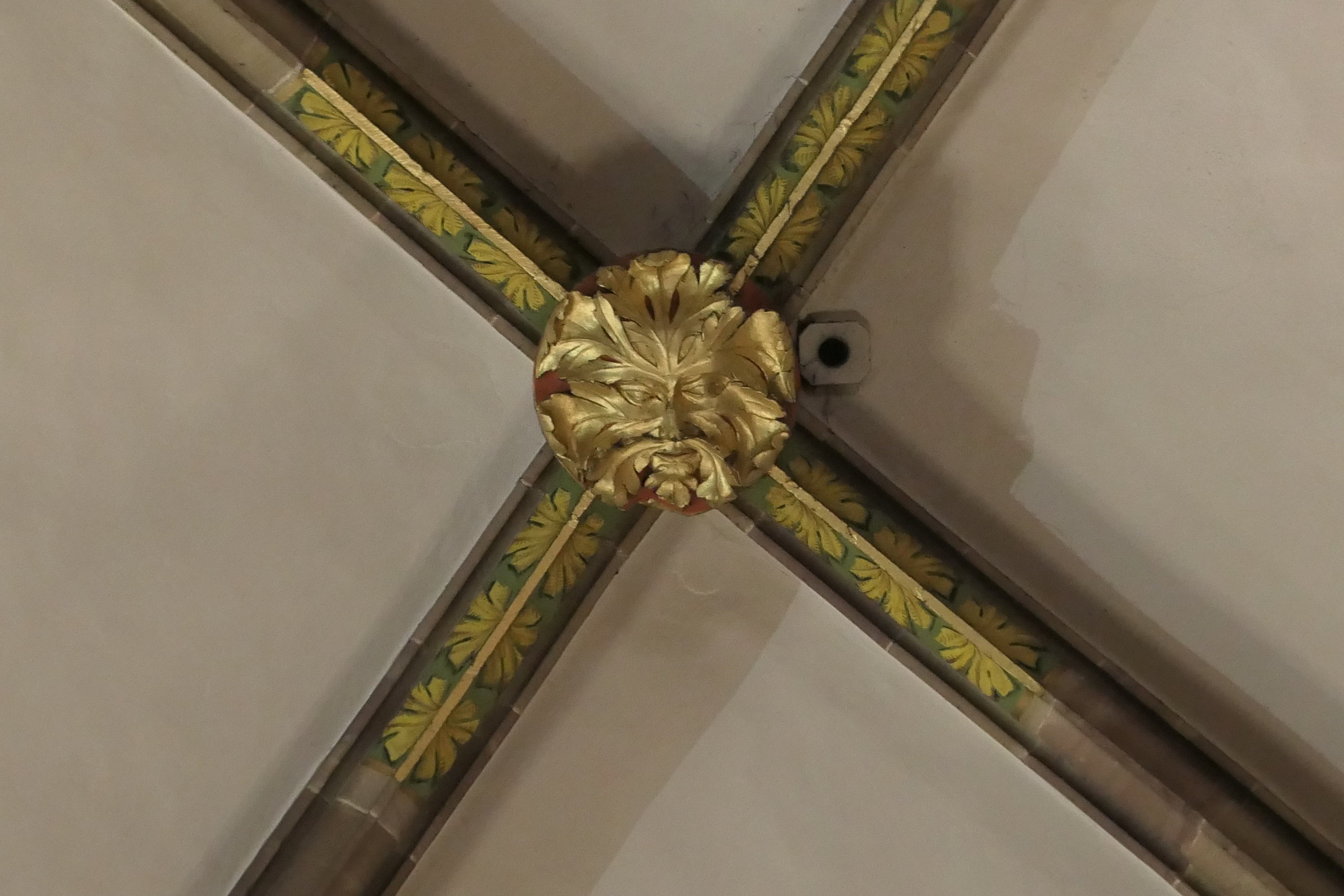 Interior of Notre-Dame de Strasbourg Schlussstein Blattmaske